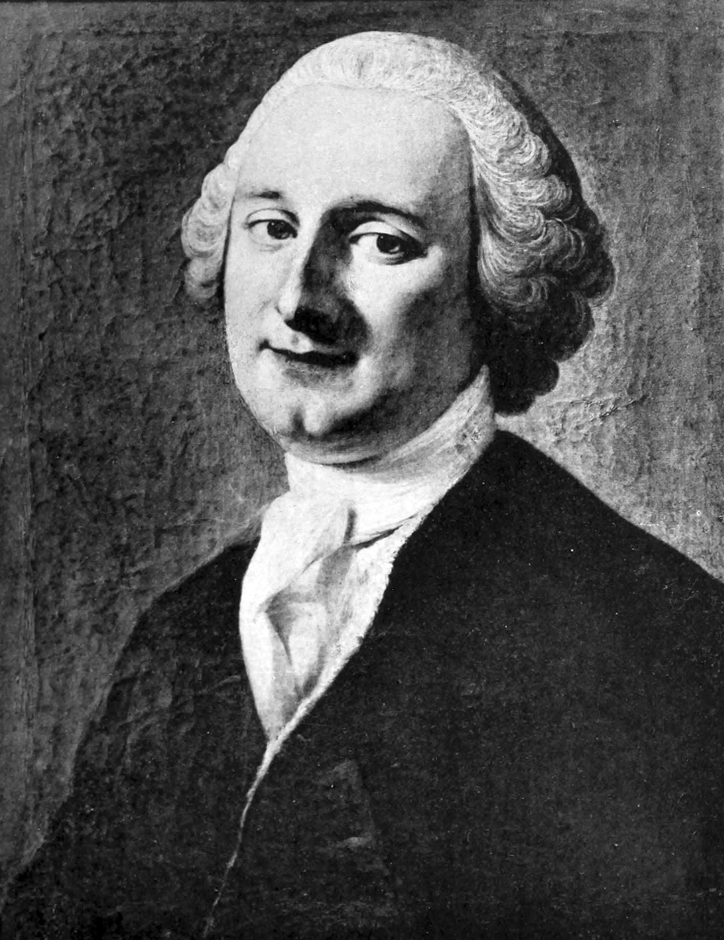 Johan Gustaf Hallman (1726-1795). Medelålders man, bröstbild, fas, hufvudet t. h., kroppen t. v. med blå ögon, grå uppkammad peruk i kanonlock öfver örat, hvit lindad halsduk, krås. Hvit väst med uppstående krage, utstående slag, mörkbrun rock med nedliggande krage, slag, axelpuff. Blåbrun bakgrund. Rund miniatyr, 51 mm. i diameter. Tillhör major F. Holmberg, Upsala.